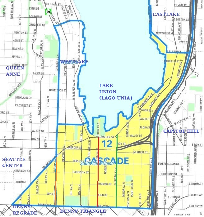 Mapo pri la kvartalo(j) Cascade/South Lake Union en Seatlo (Vaŝingtonio), bazita sur mapo el la urba kvartala atlaso sed kun aldonitaj nomoj de ĉirkaŭantaj kvartaloj, kaj koloraj limmarkiloj pri la diversaj difinoj de la okcidenta limo de Cascade